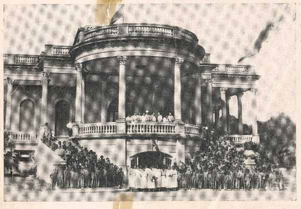 Palacio Piria de Ensenada en la década del 50.